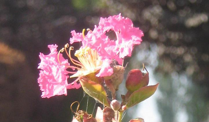 Lagerstroemia ex hortus